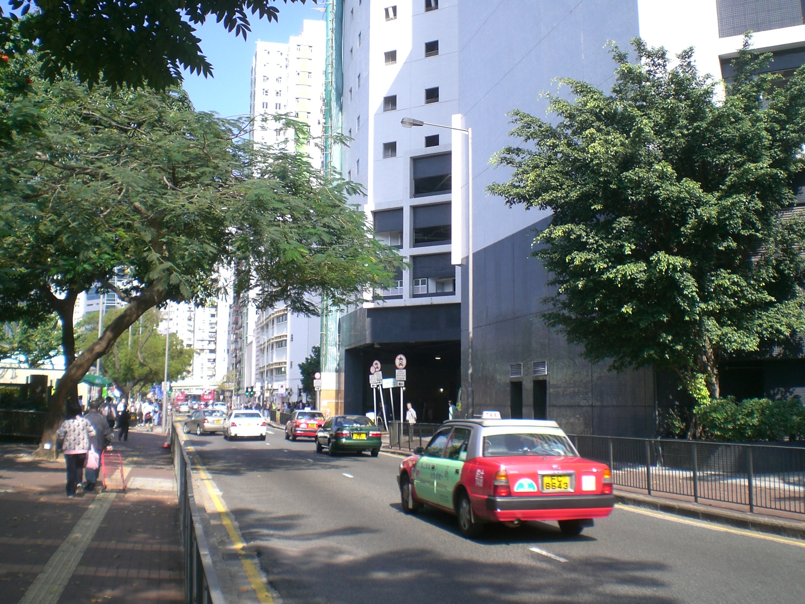 興發街近英皇道1號柏景臺